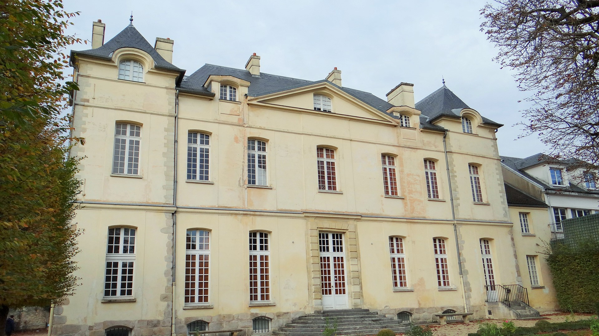 Petit Château (Sceaux, Hauts de Seine) 2016, côté jardin